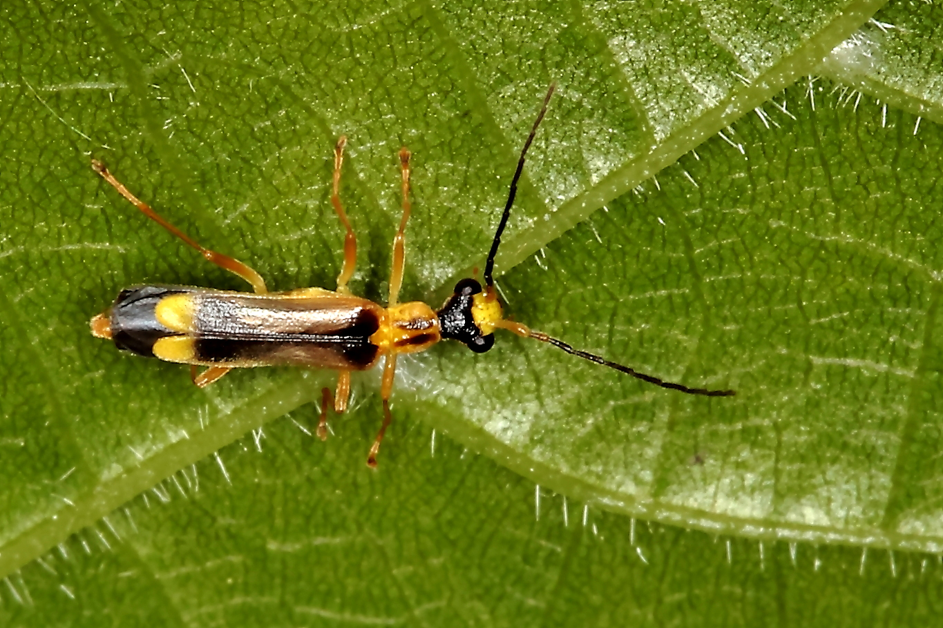 Weichkäfer: Malthinus (es könnte vielleicht punctatus sein) (Thüringen, Garten), siehe auch: File:Jacobs40.jpg, Eintrag 24